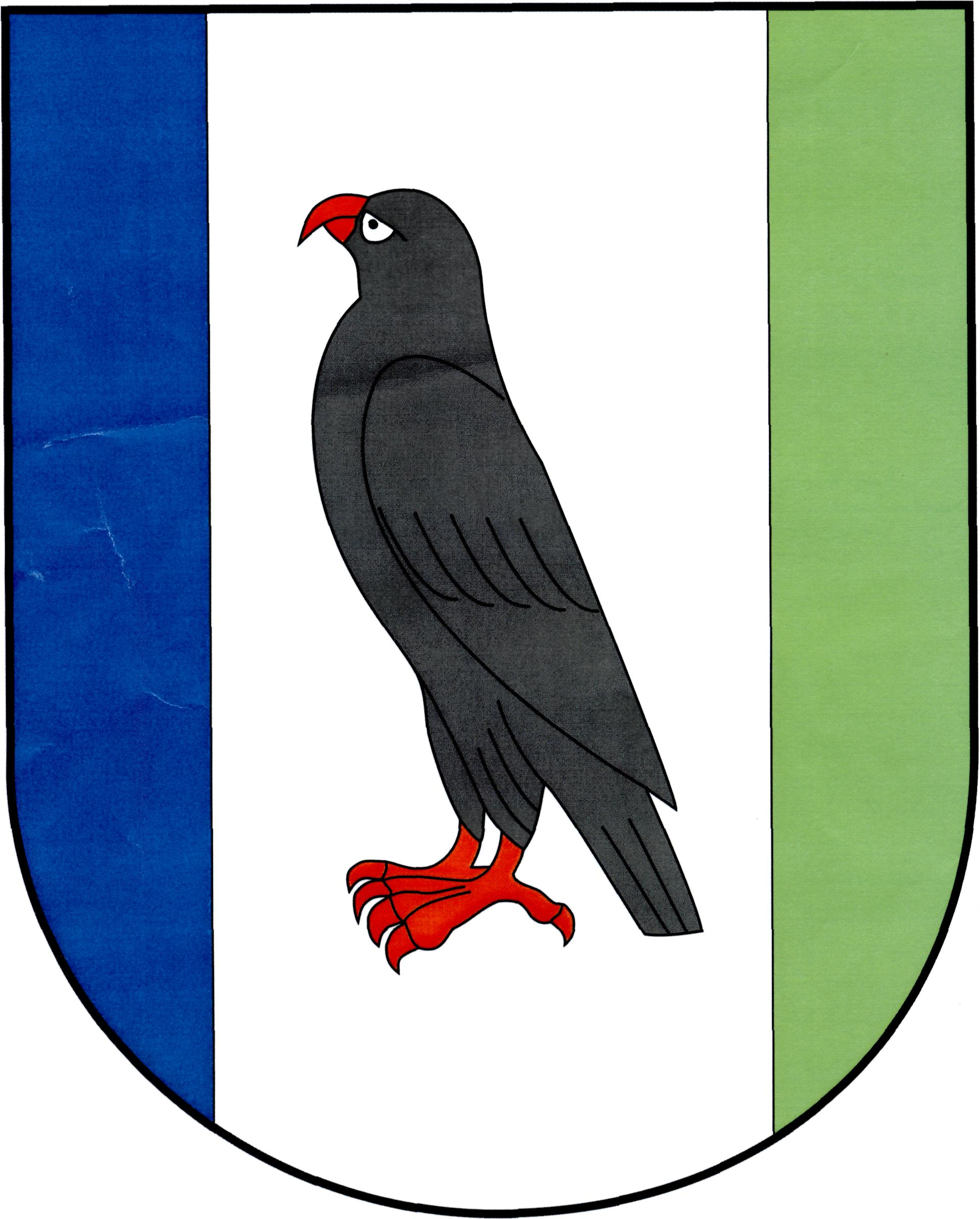 Znak obce Dolní Sokolovec